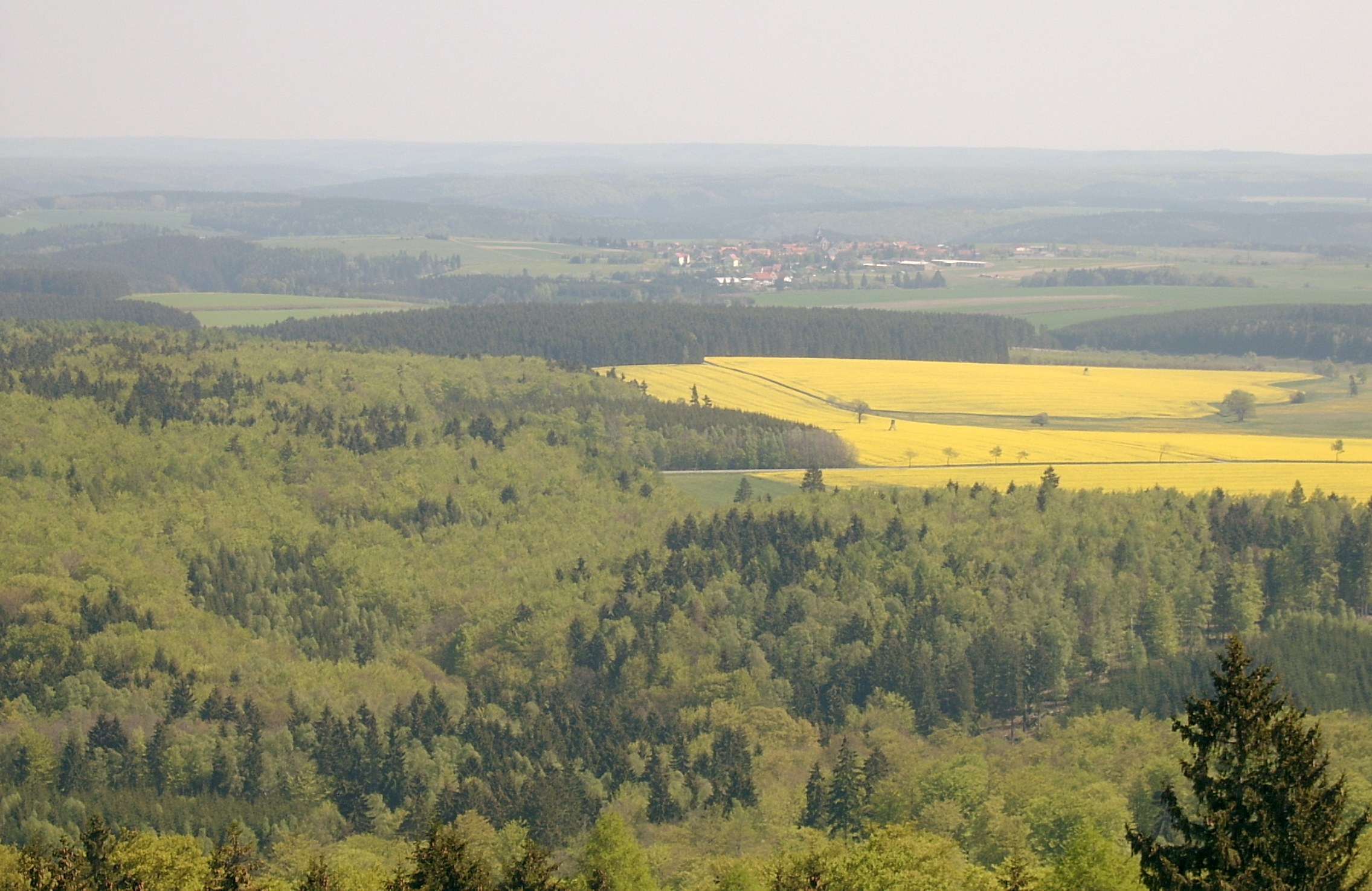 Blick vom Josephskreuz auf Hayn.